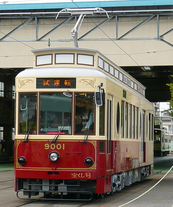 都電9000形（レトロ風車両）